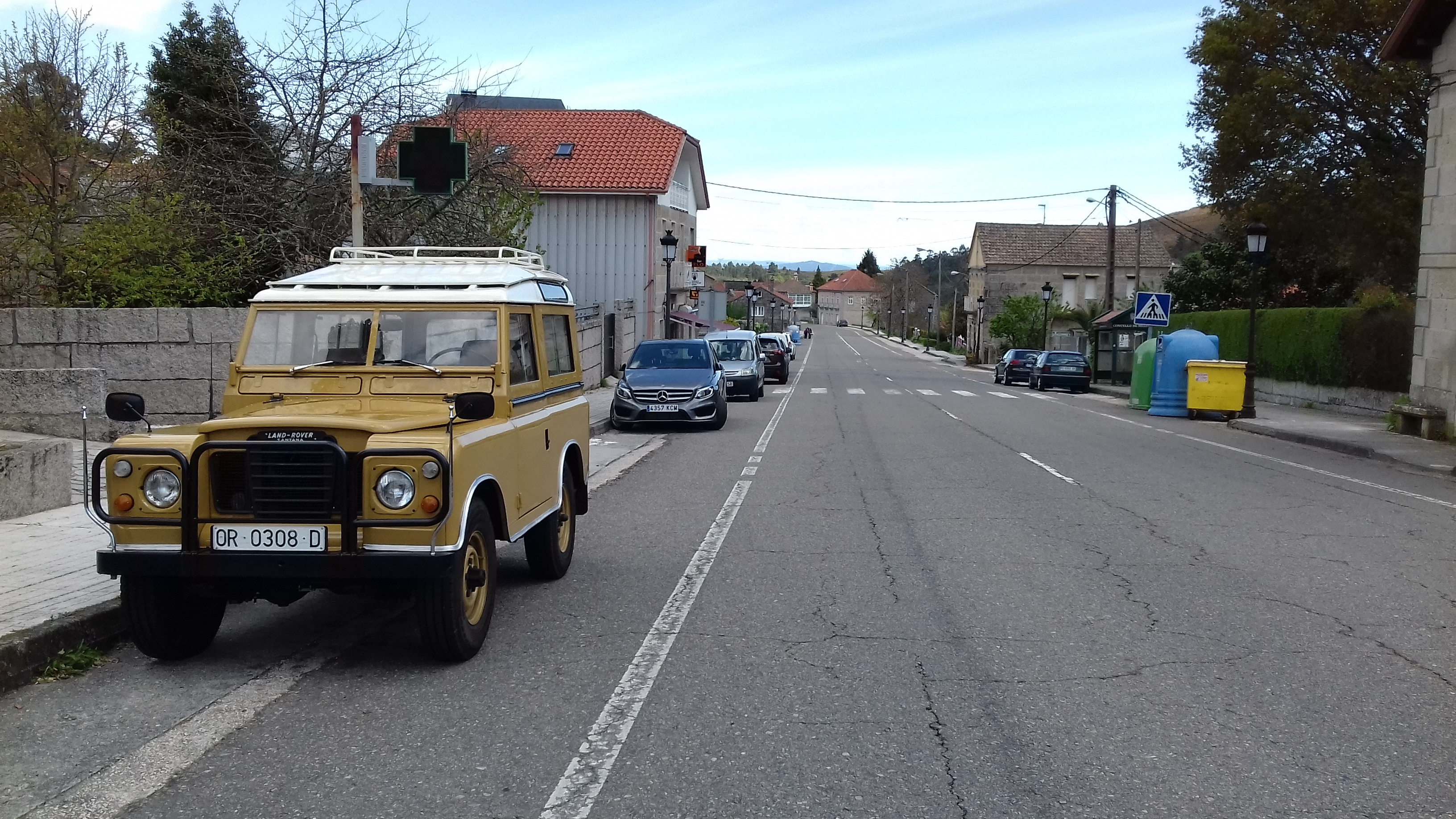 Estrada N-120 ao seu paso por Melón. Á esquerda, un Land Rover